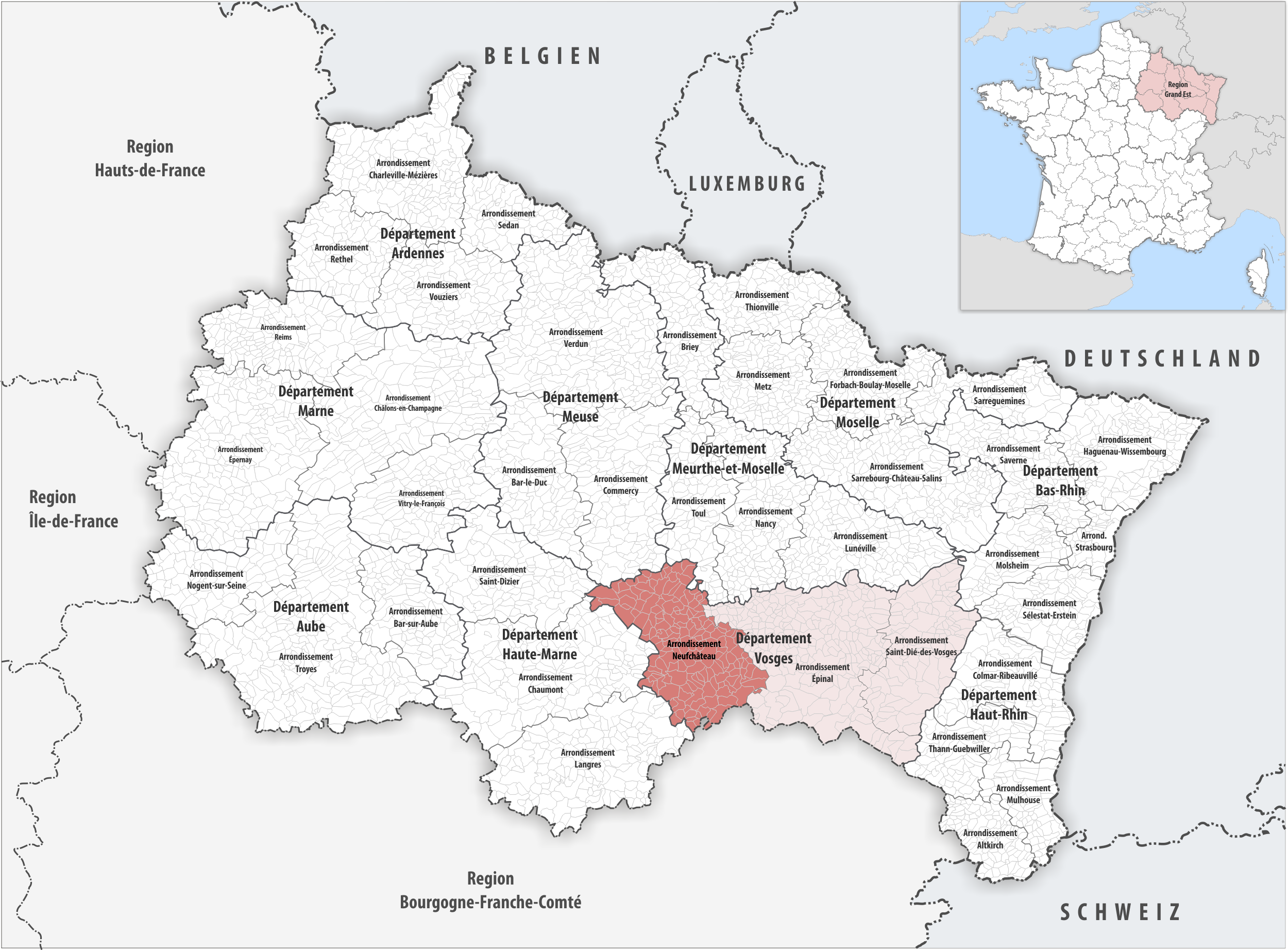 Lage des Arrondissements Neufchâteau